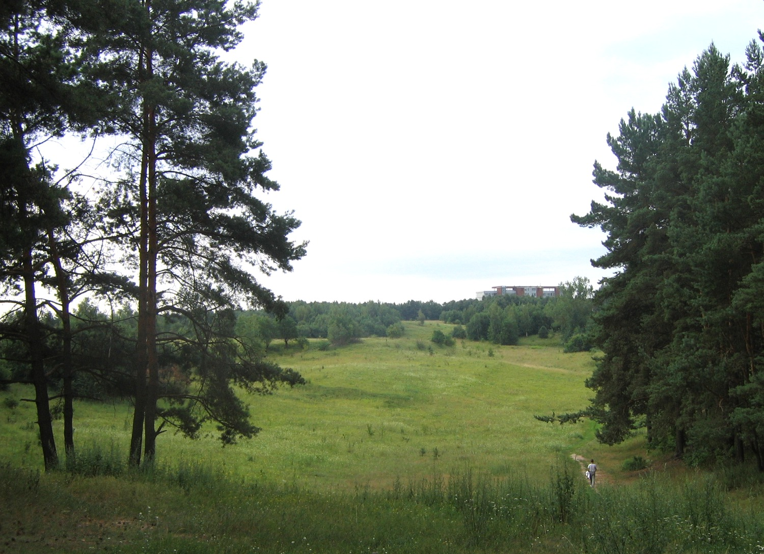 Autoriaus nuotrauka. 2006.07.29. Šeškinės ozas. Tolumoje - „Akropolio“ pastatai.